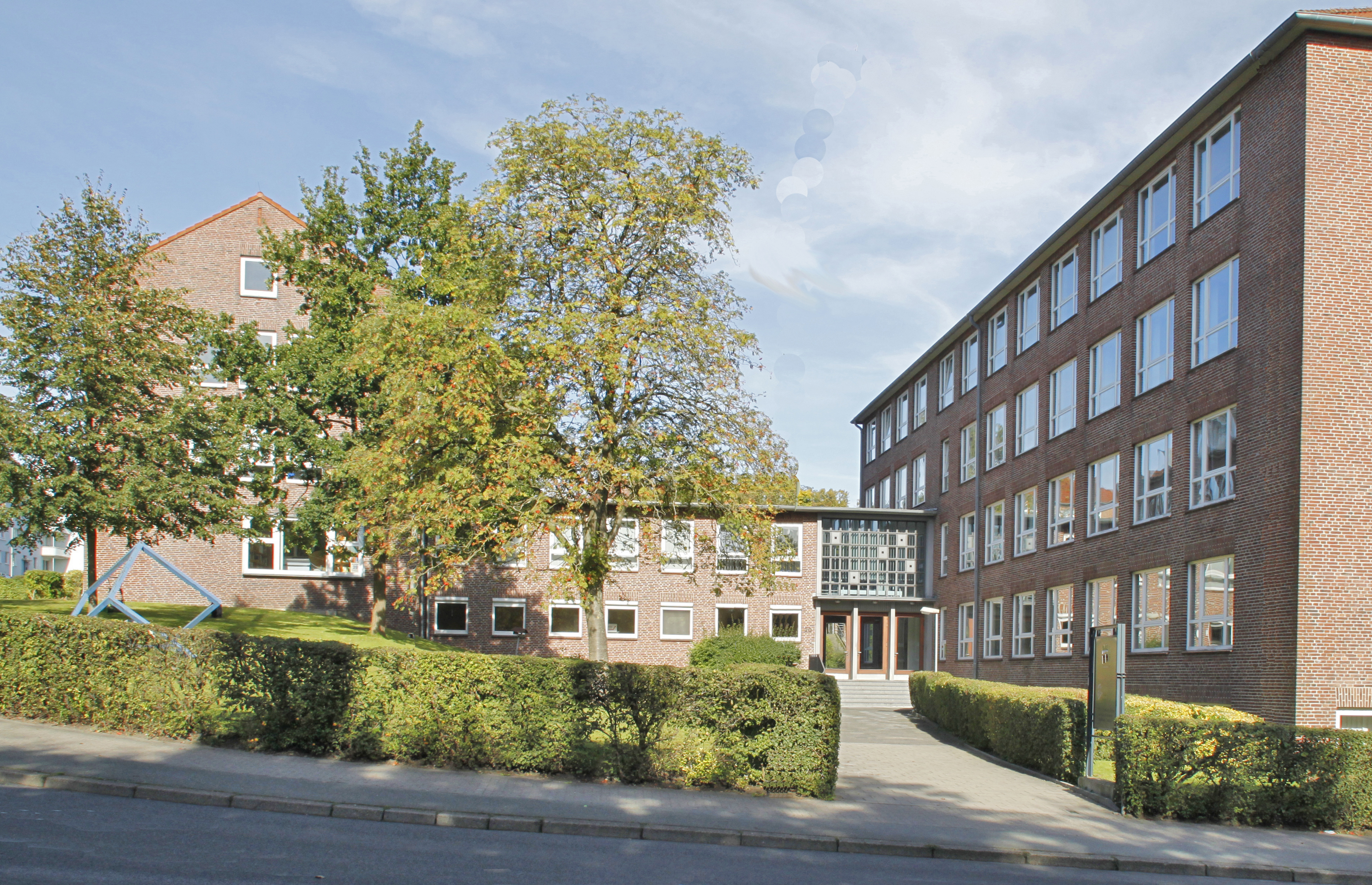 Südseite der Fachschule für Technik und Gestaltung in Flensburg